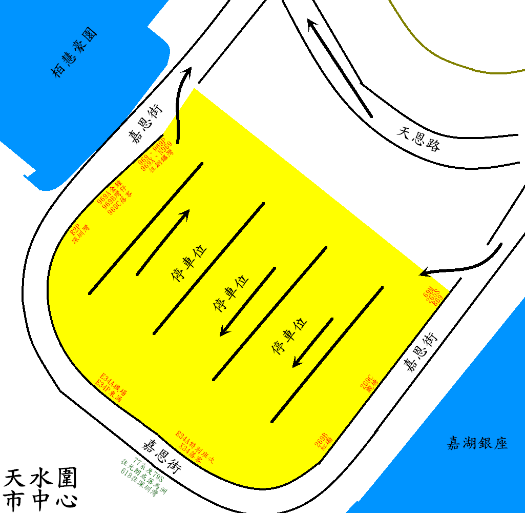 中文（香港）: 天水圍市中心公共運輸交匯處的平面圖